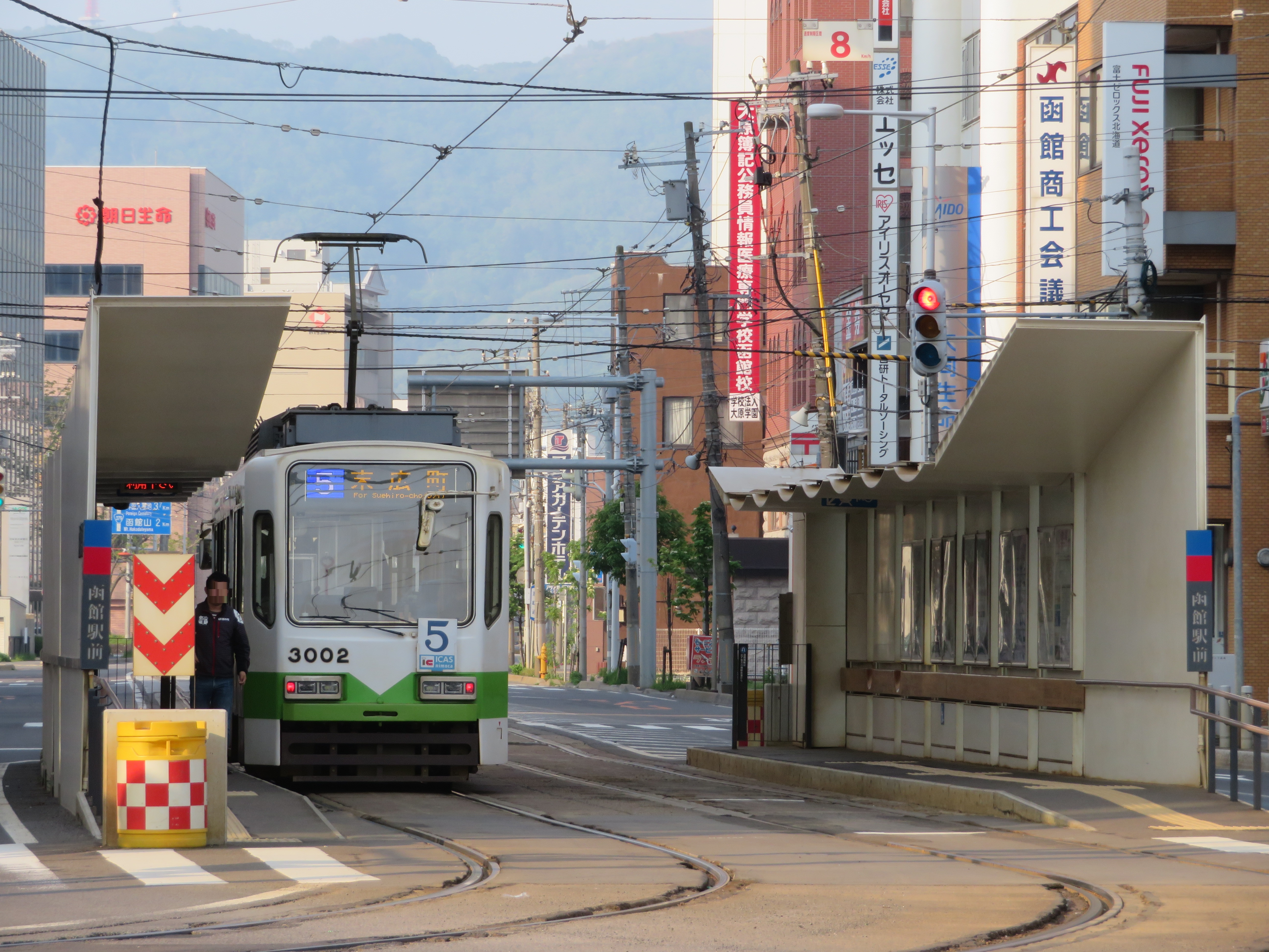 函館駅前停留所